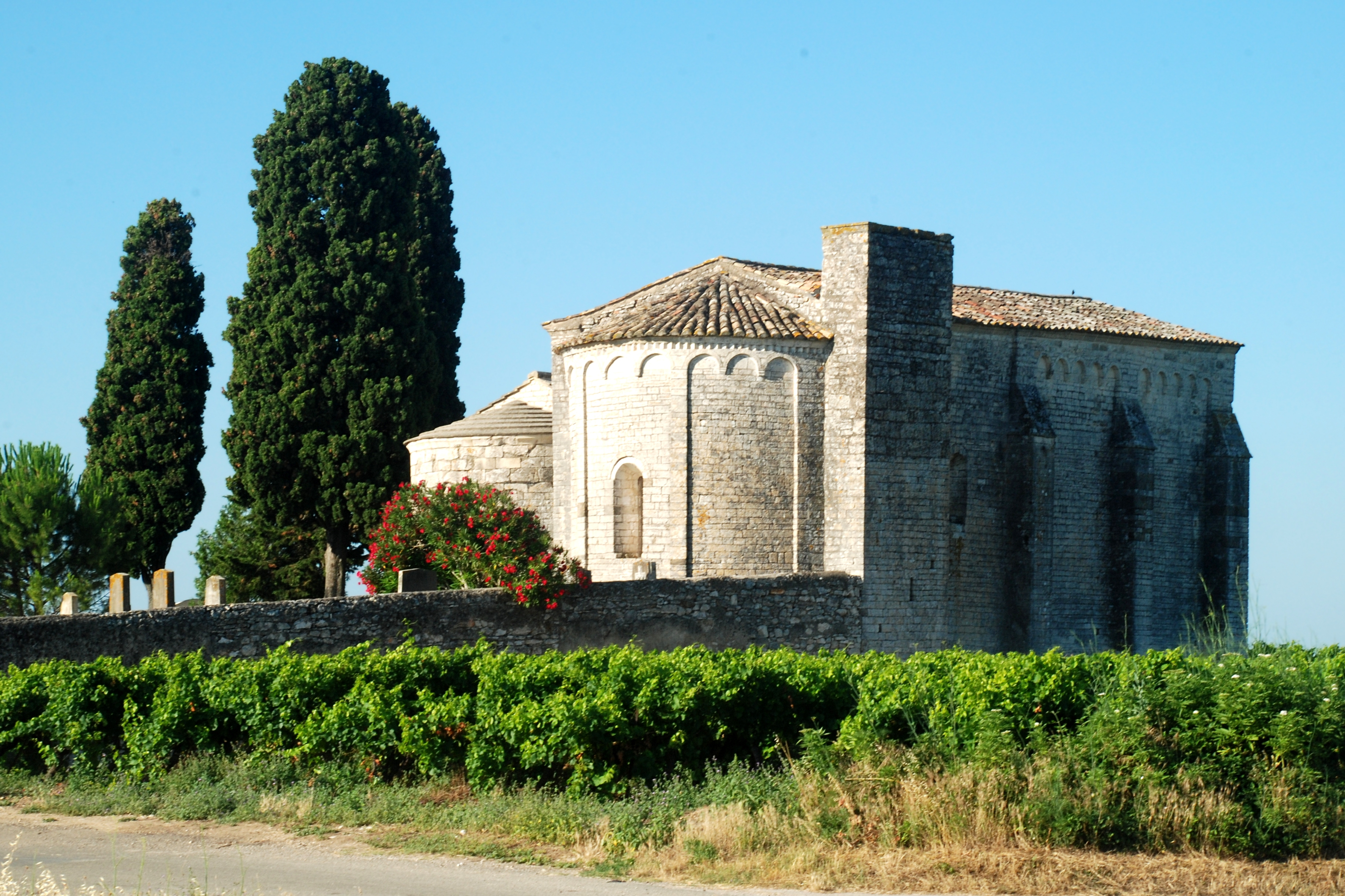 France - Languedoc - Gard - Chapelle Saint-Julien de Montredon